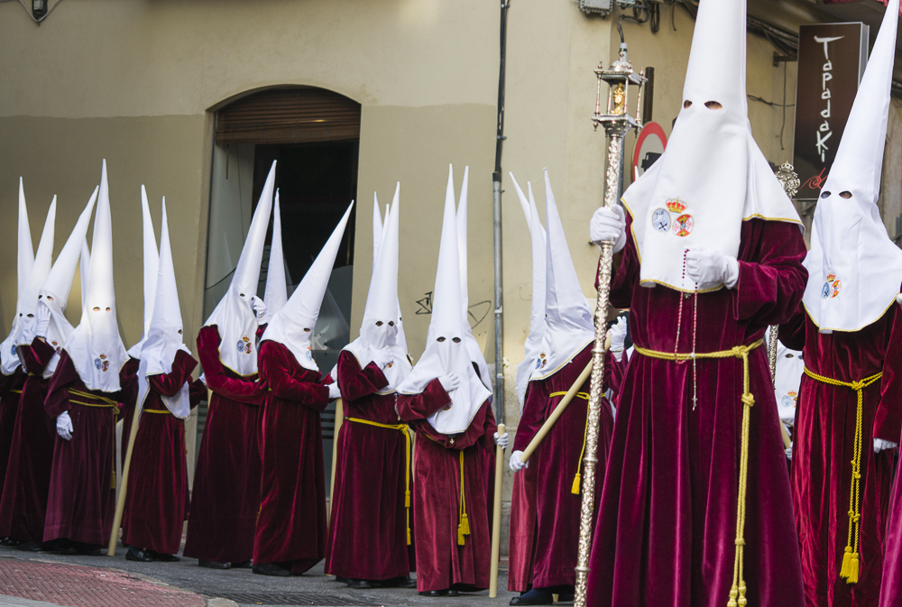 2014 Holy Week in Málaga